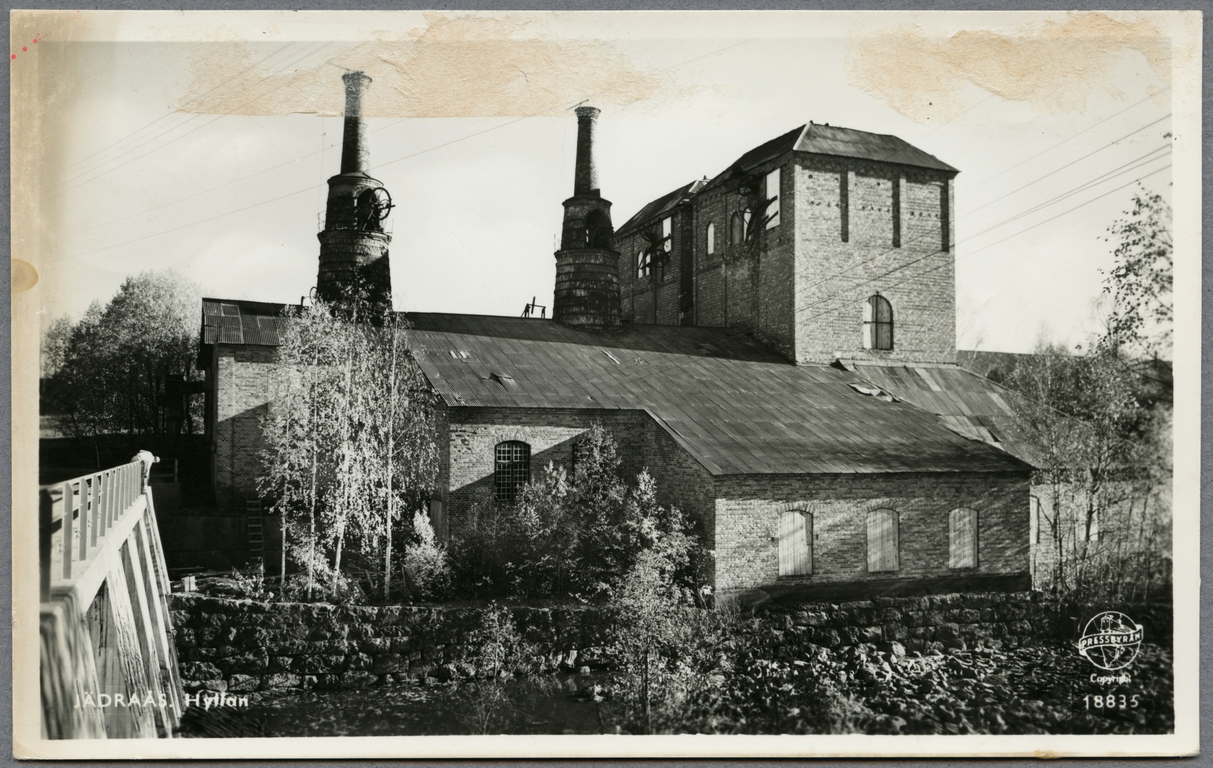 Hyttan i Jädraås, Ockelbo, Gästrikland. Vykort, Pressbyrån. "Jädraås, Hyttan".